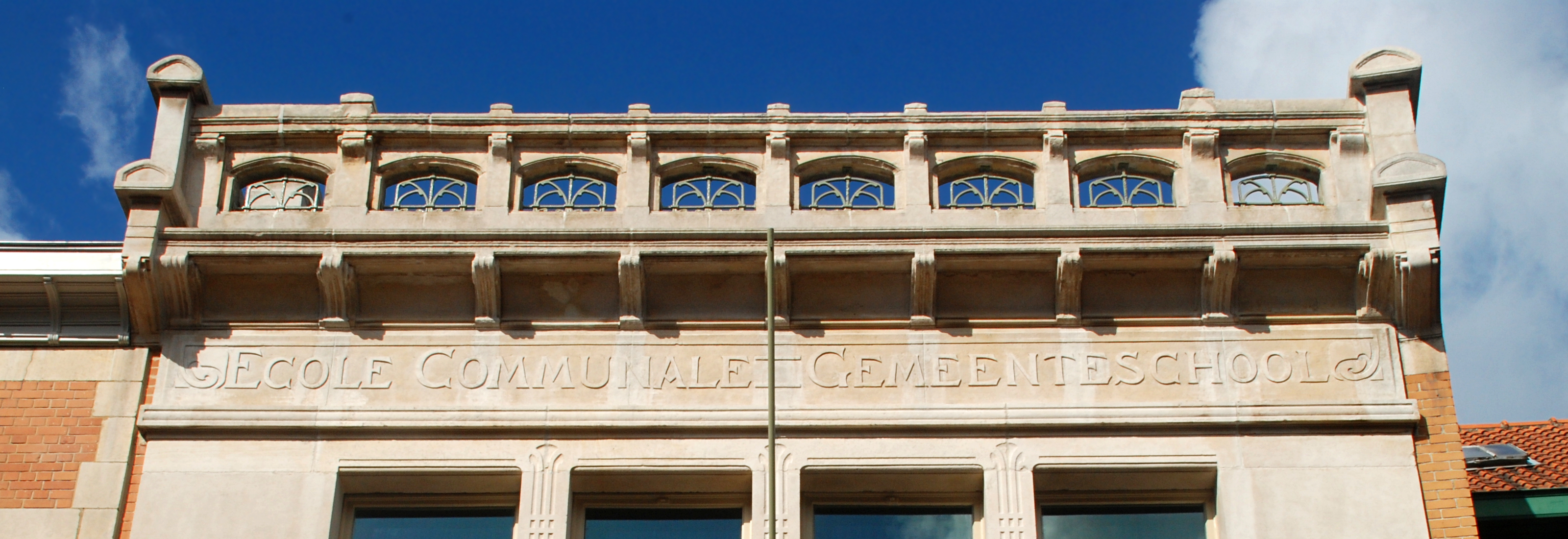 Belgique - Bruxelles - École Rodenbach (Art nouveau - architecte Henri Jacobs - 1905-1911)